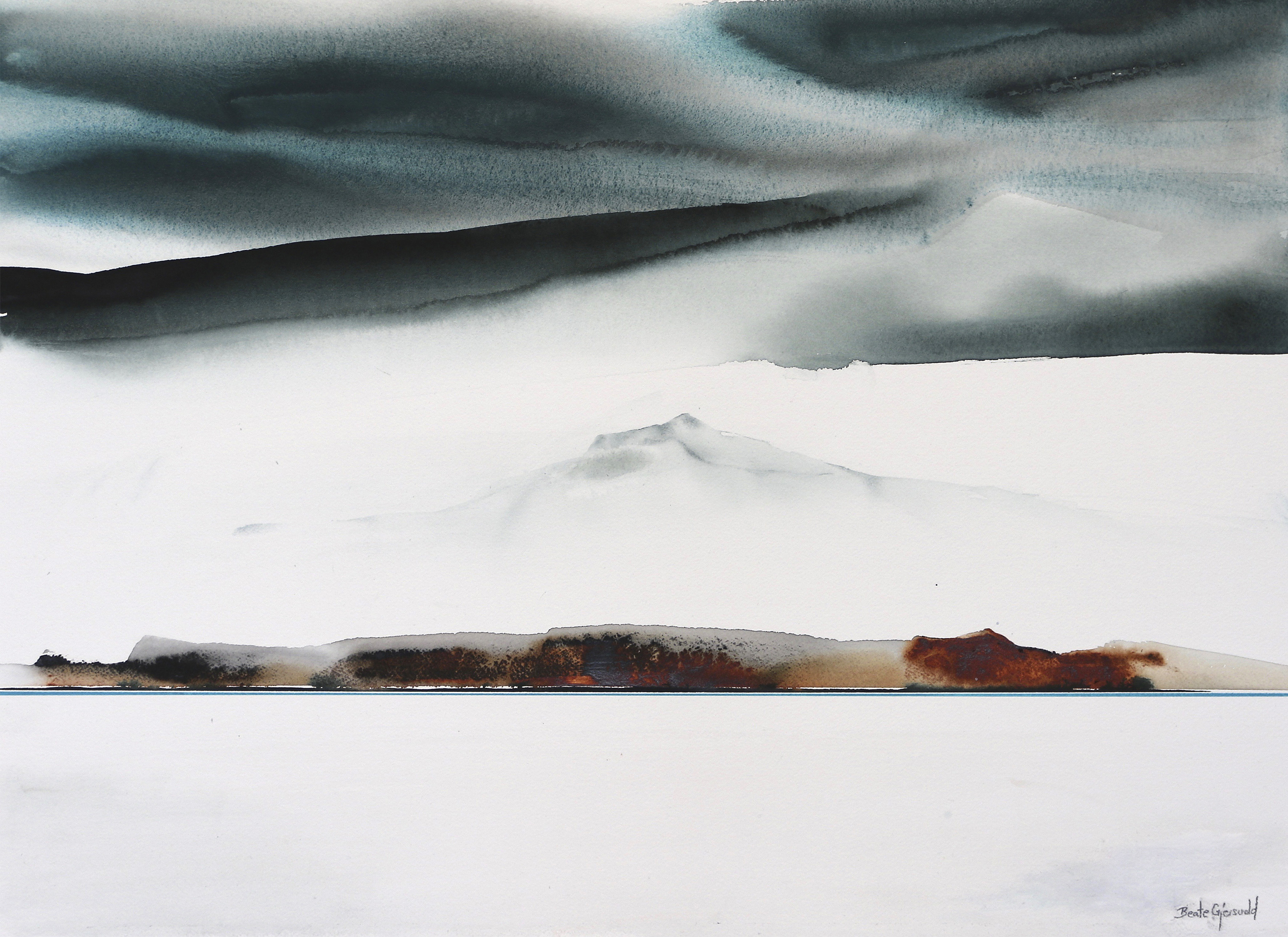 Akvarell av den norske kunstneren Beate Gjersvold: Silence is so accurate, I, 76 x 93 cm, 2017